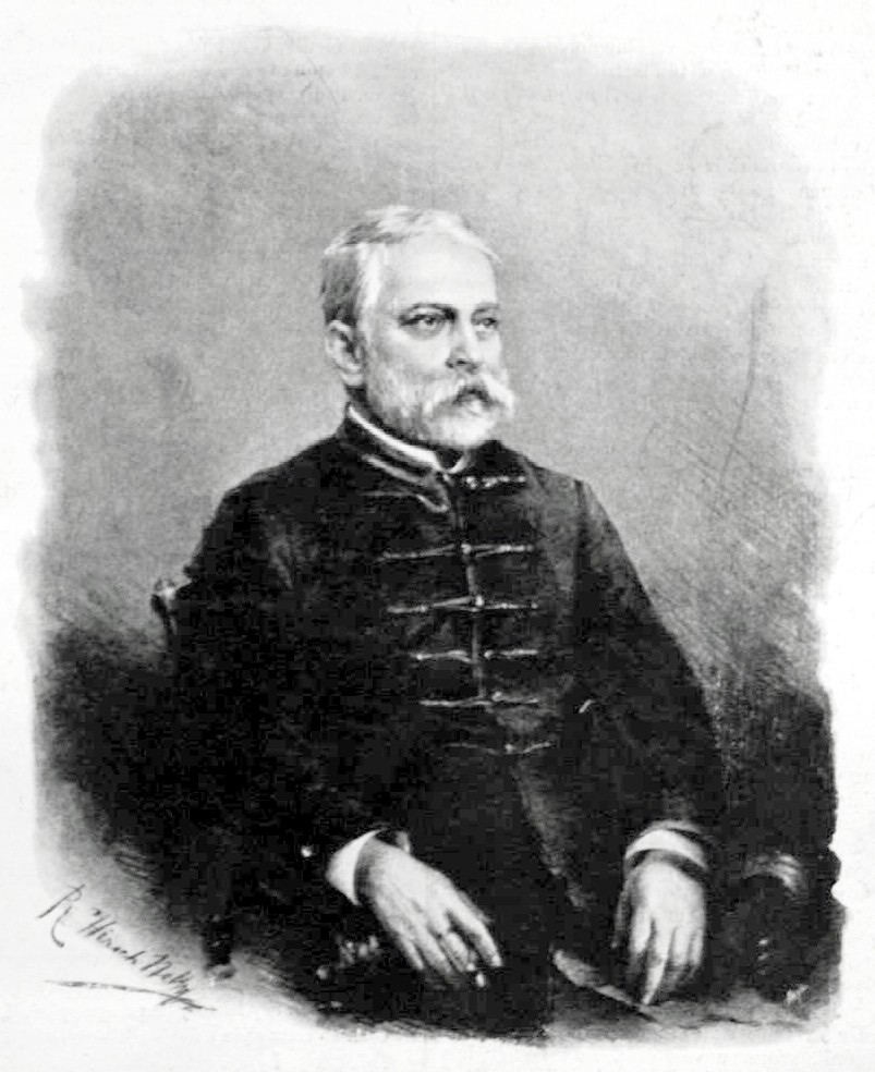 Gyulai Pál (1826–1909) író, költő, irodalomtörténész, kritikus, a Kisfaludy Társaság elnöke, a Magyar Tudományos Akadémia tagja portréja. Radóné Hirsch Nelly rajza